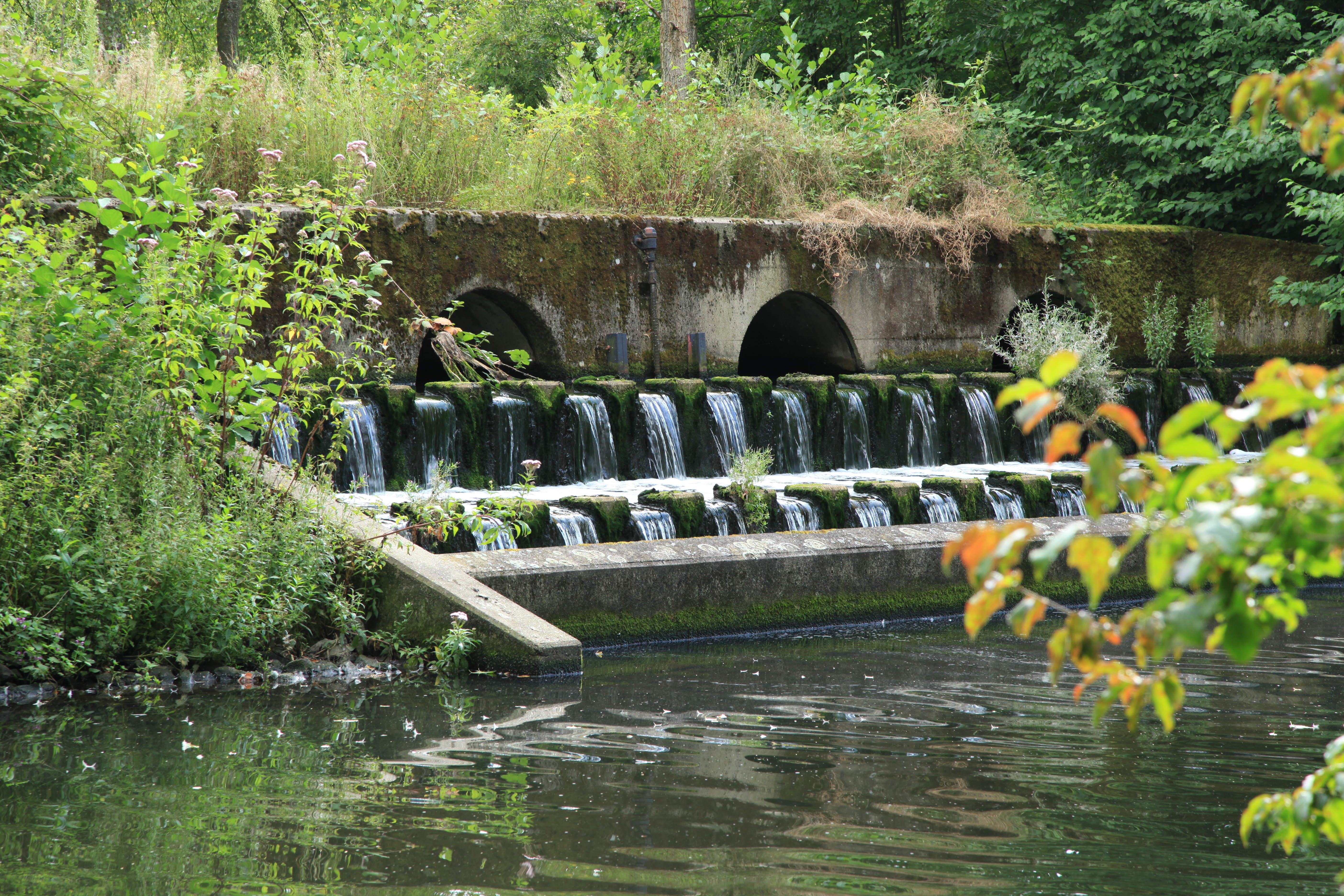 Klärteiche des Klärwerk Oelbachtal, Auf dem Kalwes in Bochum